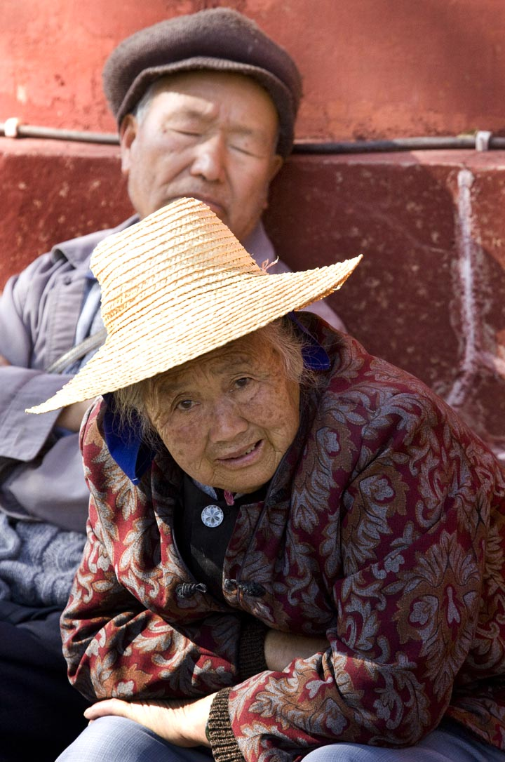 China